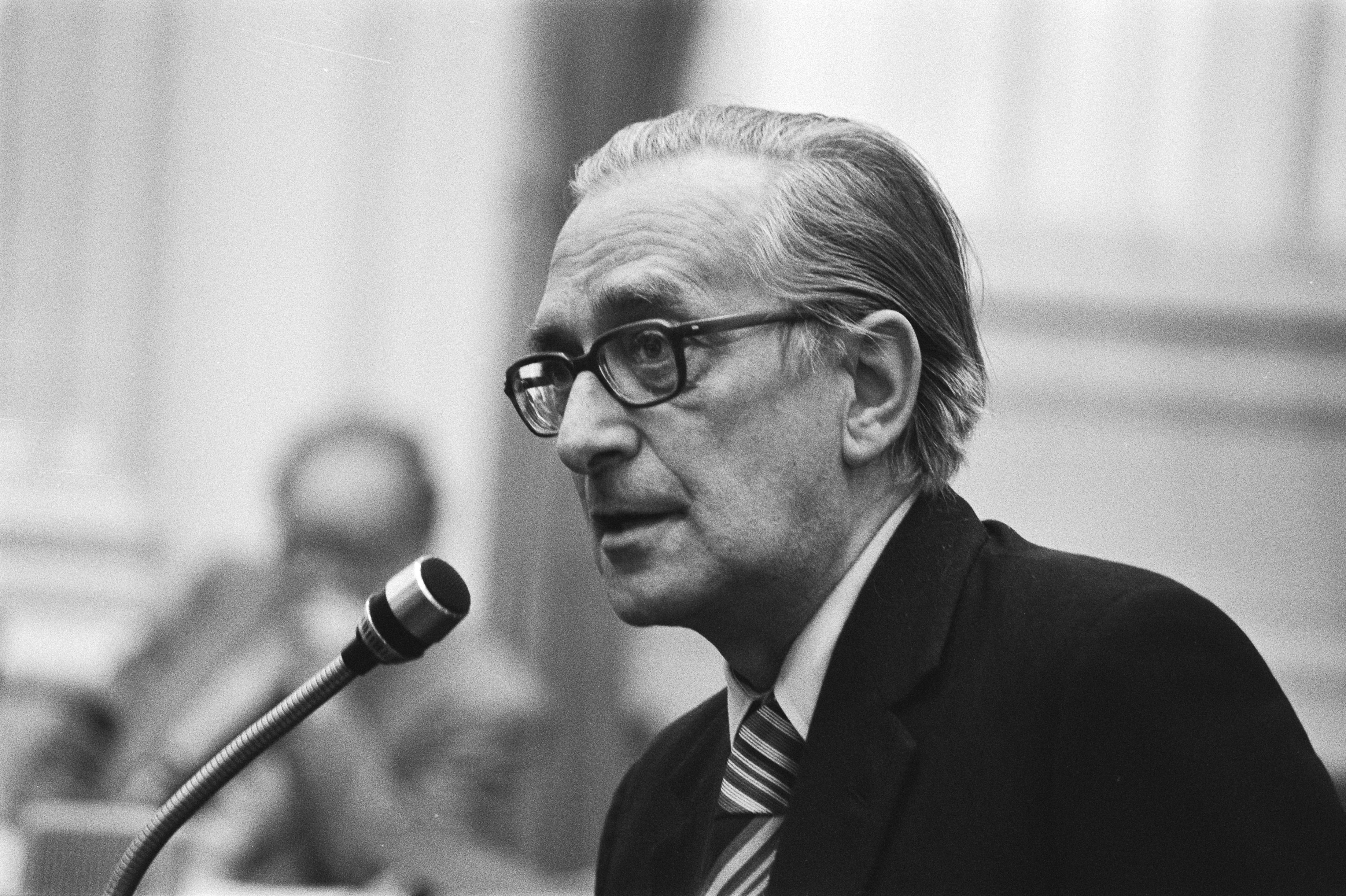 Collectie / Archief : Fotocollectie Anefo Reportage / Serie : Tweede Kamer: behandeling collegegelden HBO-studenten Beschrijving : Joekes (VVD) aan het woord Datum : 29 september 1981 Locatie : Den Haag, Zuid-Holland Trefwoorden : parlementaire debatten, politici, portretten Persoonsnaam : Joekes, Theo Instellingsnaam : Tweede Kamer, VVD Fotograaf : Antonisse, Marcel / Anefo Auteursrechthebbende : Nationaal Archief Materiaalsoort : Negatief (zwart/wit) Nummer archiefinventaris : bekijk toegang 2.24.01.05 Bestanddeelnummer : 931-7117